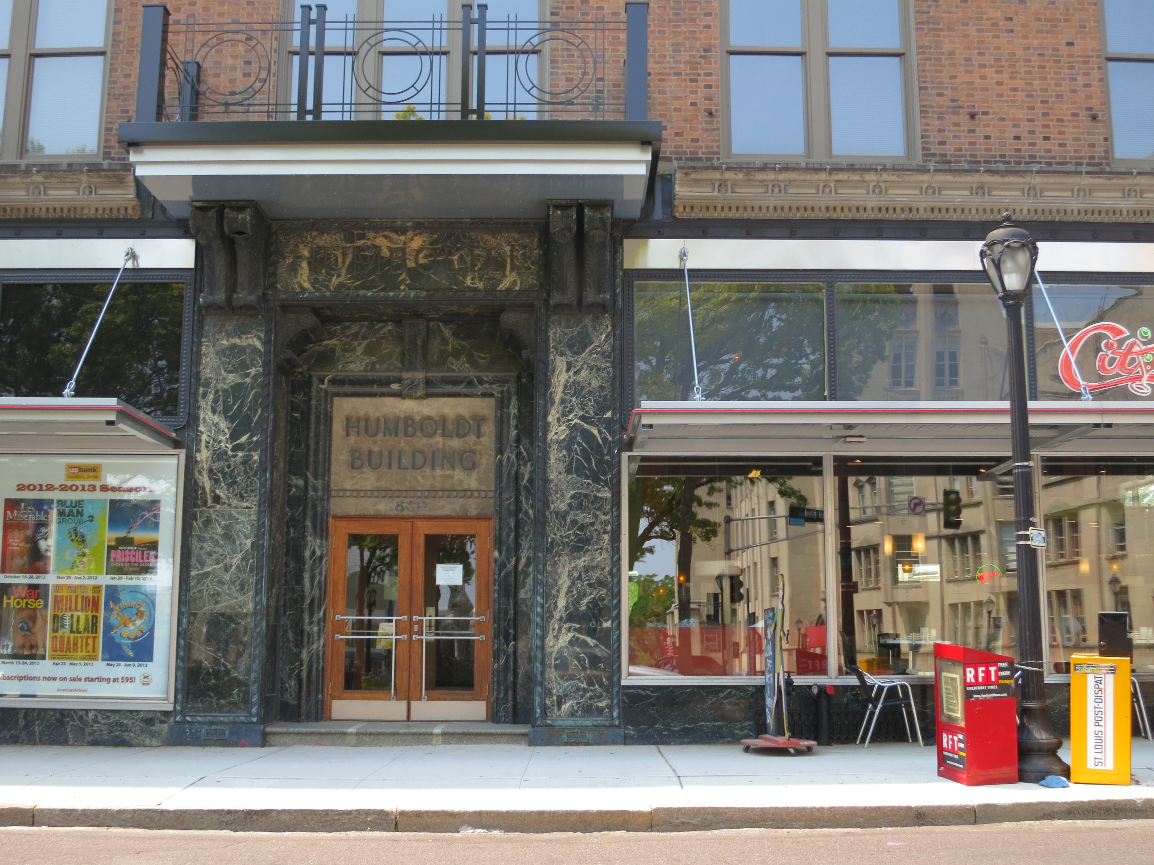 Humboldt Building